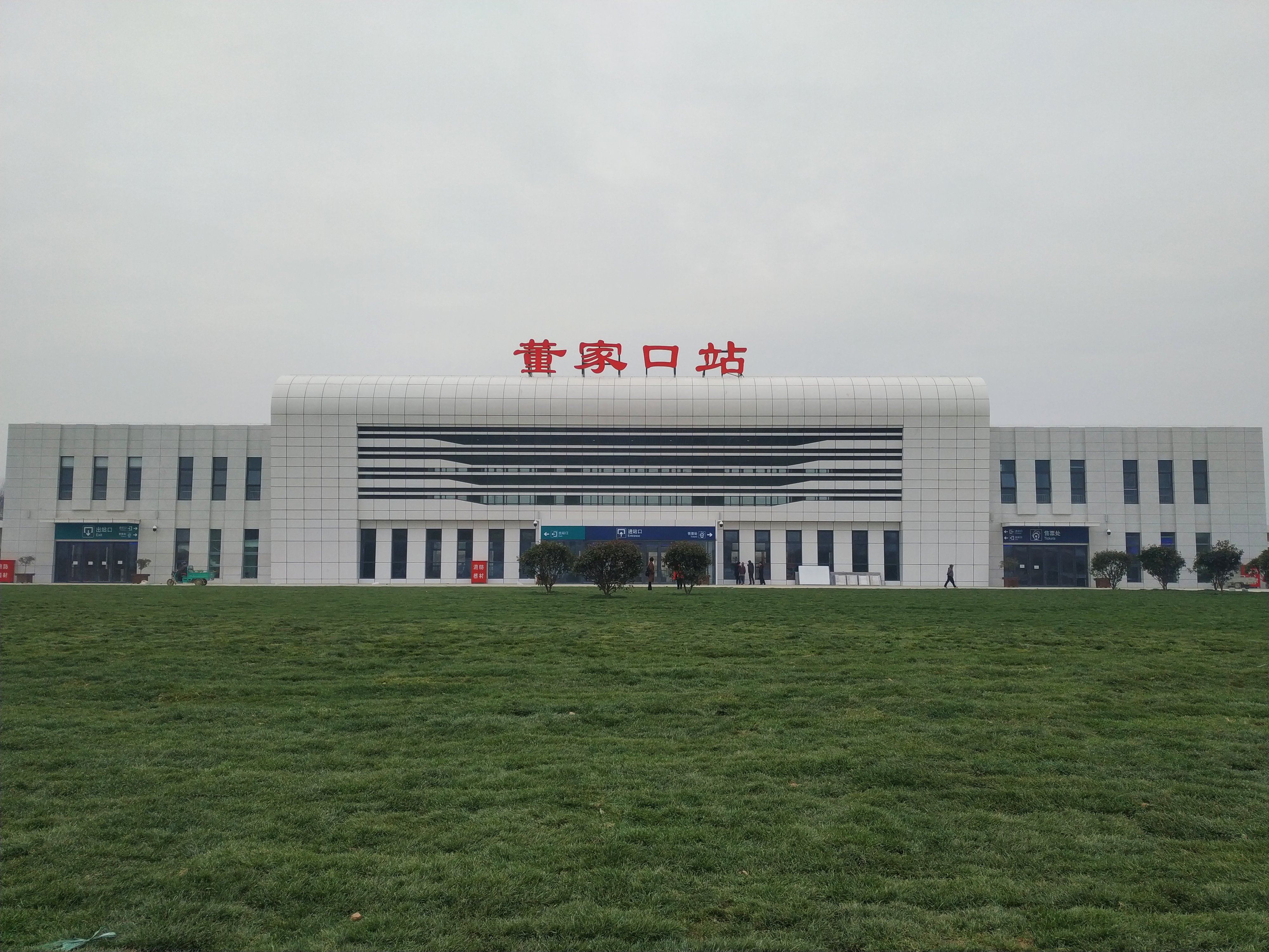 青连铁路董家口站